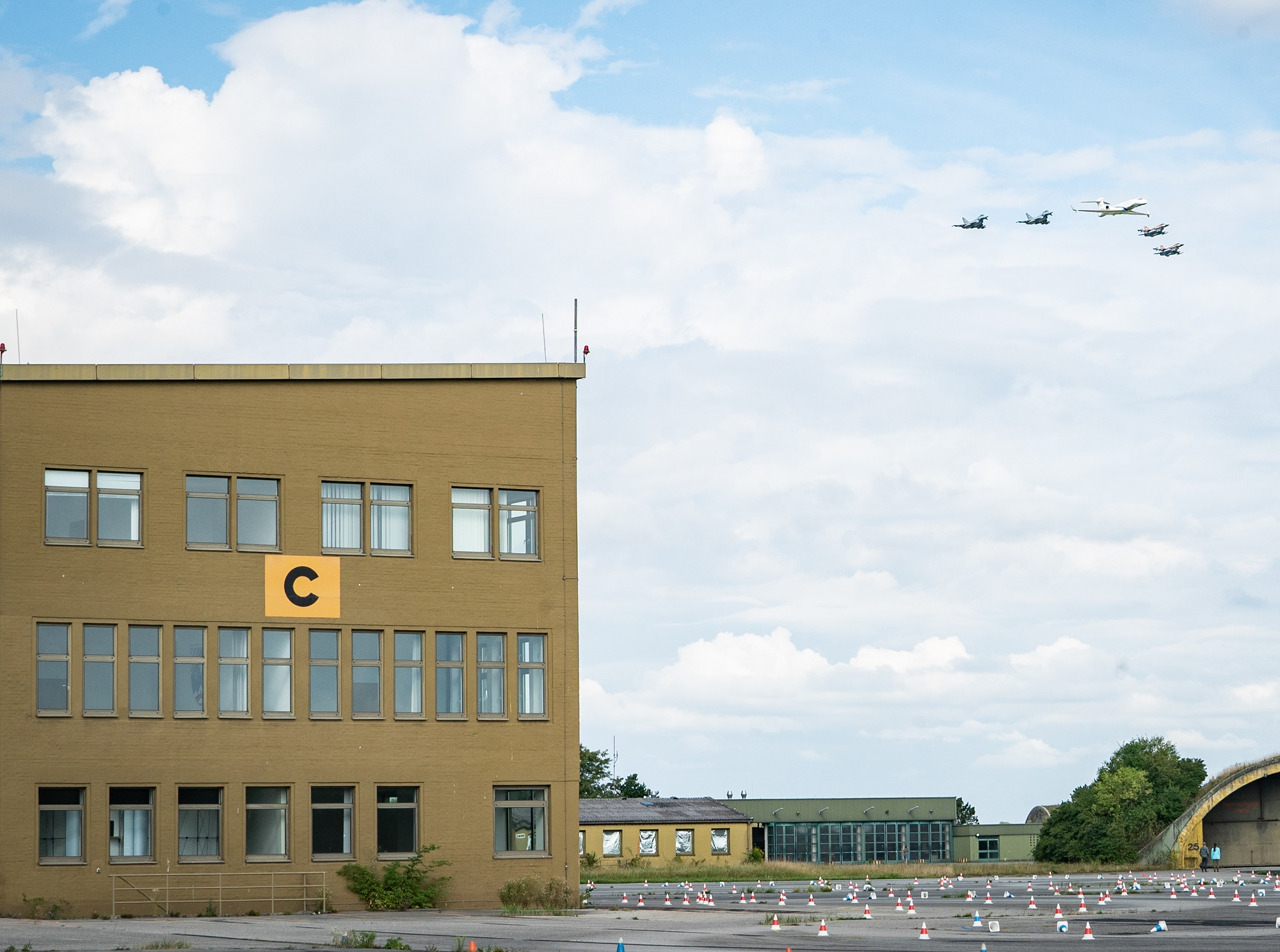 היום (שלישי), התקיים כחלק מתרגיל חיל האוויר בגרמניה, מטס "זיכרון לעתיד" - מטס הצדעה משותף בהובלת מפקד חיל האוויר, אלוף עמיקם נורקין, בליווי מפקדת טייסת הטיסה הראשונה בחיל-האוויר הישראלי, מפקדת טייסת "הנחשון", סגן-אלוף ג', ולצד מפקד חיל האוויר הגרמני, לוטננט גנרל אינגו גרהארץ.